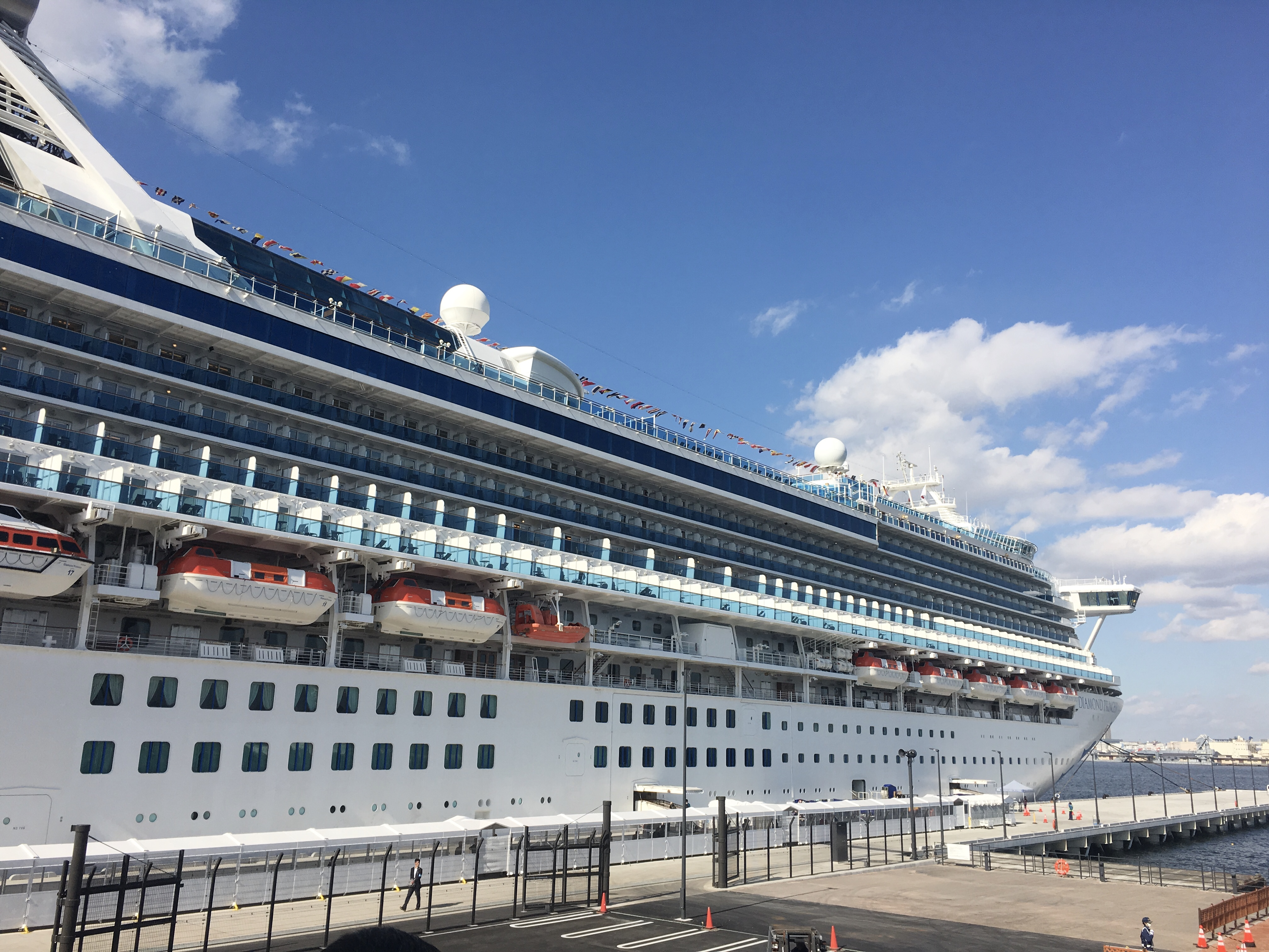 横浜市中区新港にある複合施設「横浜ハンマーヘッド」（新港ふ頭客船ターミナル）へ2019年11月4日に第一号入港したクルーズ客船「ダイヤモンドプリンセス」。